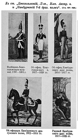 Это изображение было использовано для иллюстрирования статей «Кексгольмский, лейб-гвардии, Императора Австрийского, полк» и «Кинбурнский, 7-й драгунский, полк»опубликованных в двенадцатом томе «Военной энциклопедии», который был издан книгоиздательским товариществом И. Д. Сытина в 1913 году в столице Российской империи городе Санкт-Петербурге. Более подробное описание к этой картинке можно прочесть в указанных выше статьях.